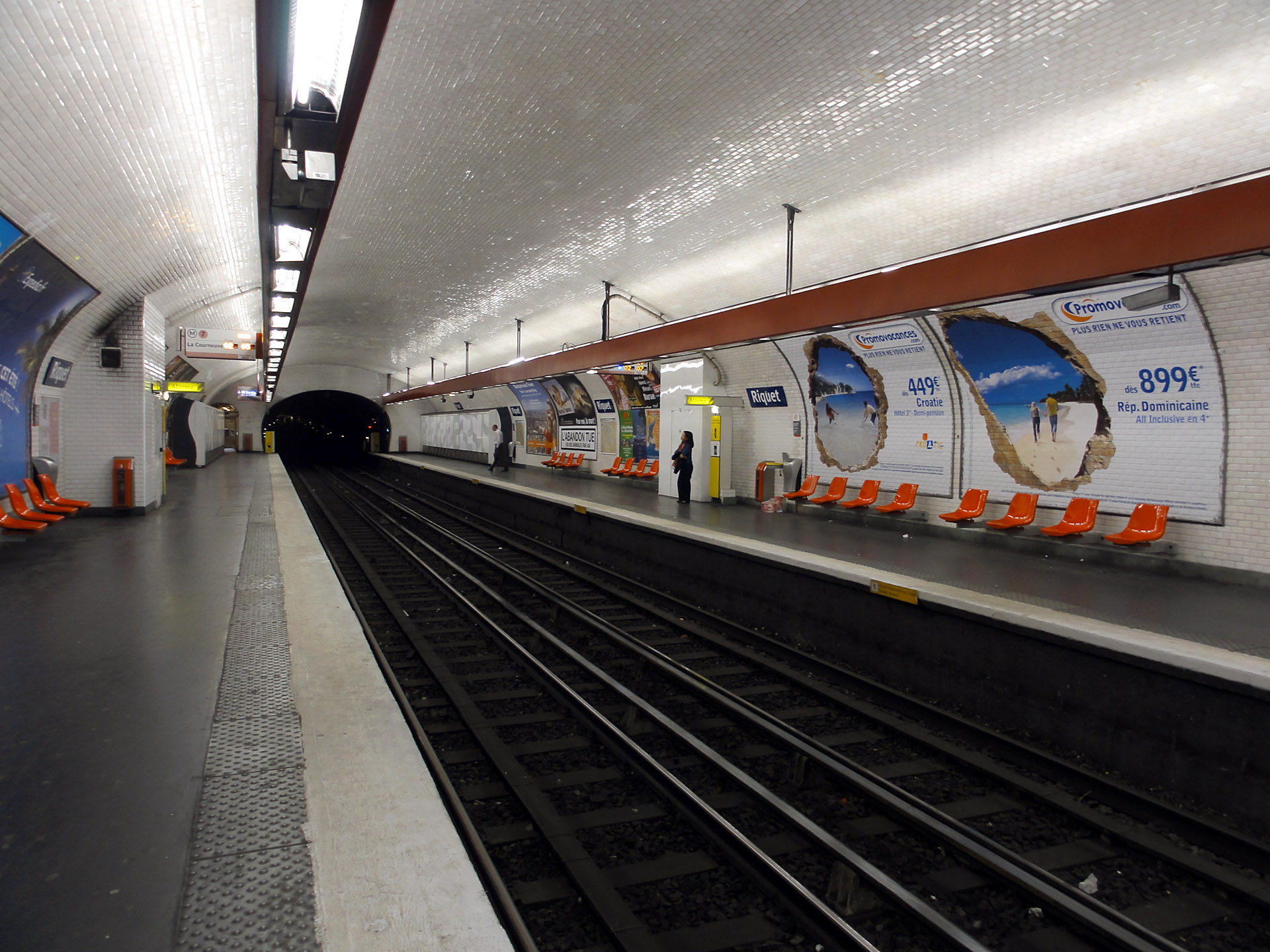 La station Riquet de la ligne 7 du métro de Paris, France.